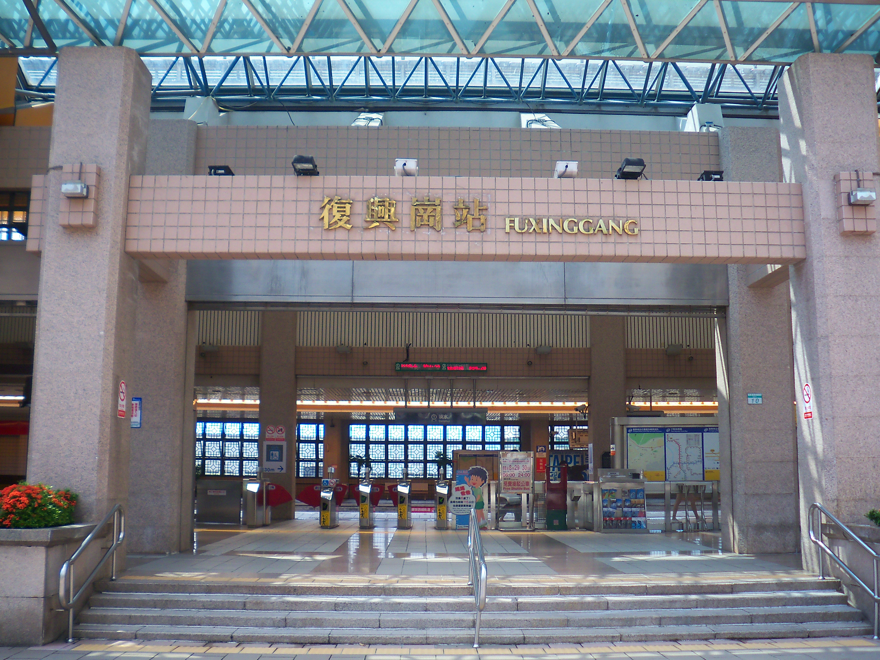 台北捷運復興崗站1號出口。